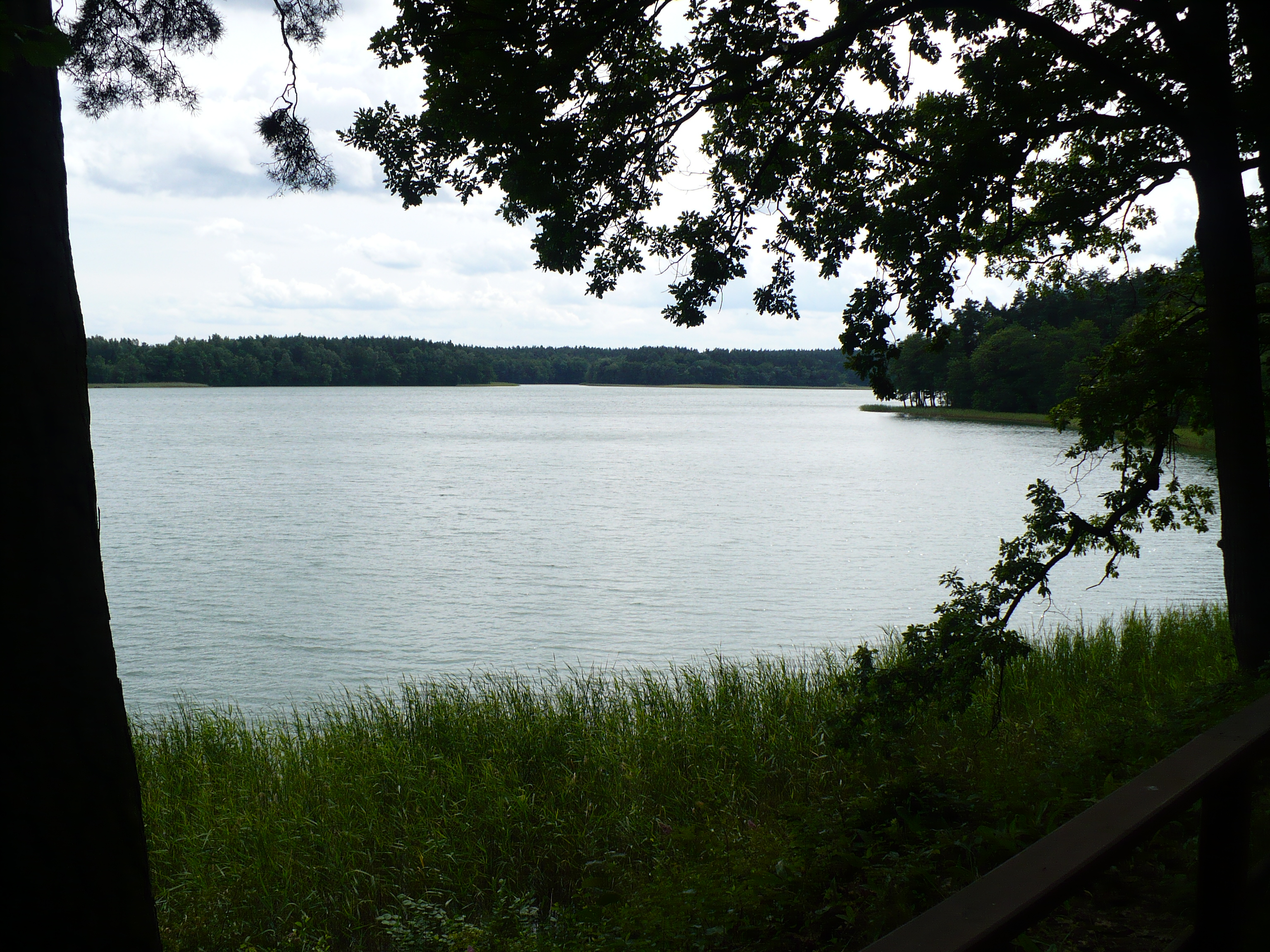 Poland, Borzechowskie Wielkie Lake.